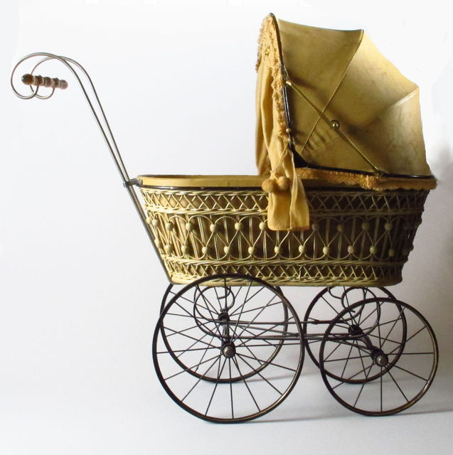 Sigrid Juséliukselle kuuluneet nukenvaunut Satakunnan Museossa.